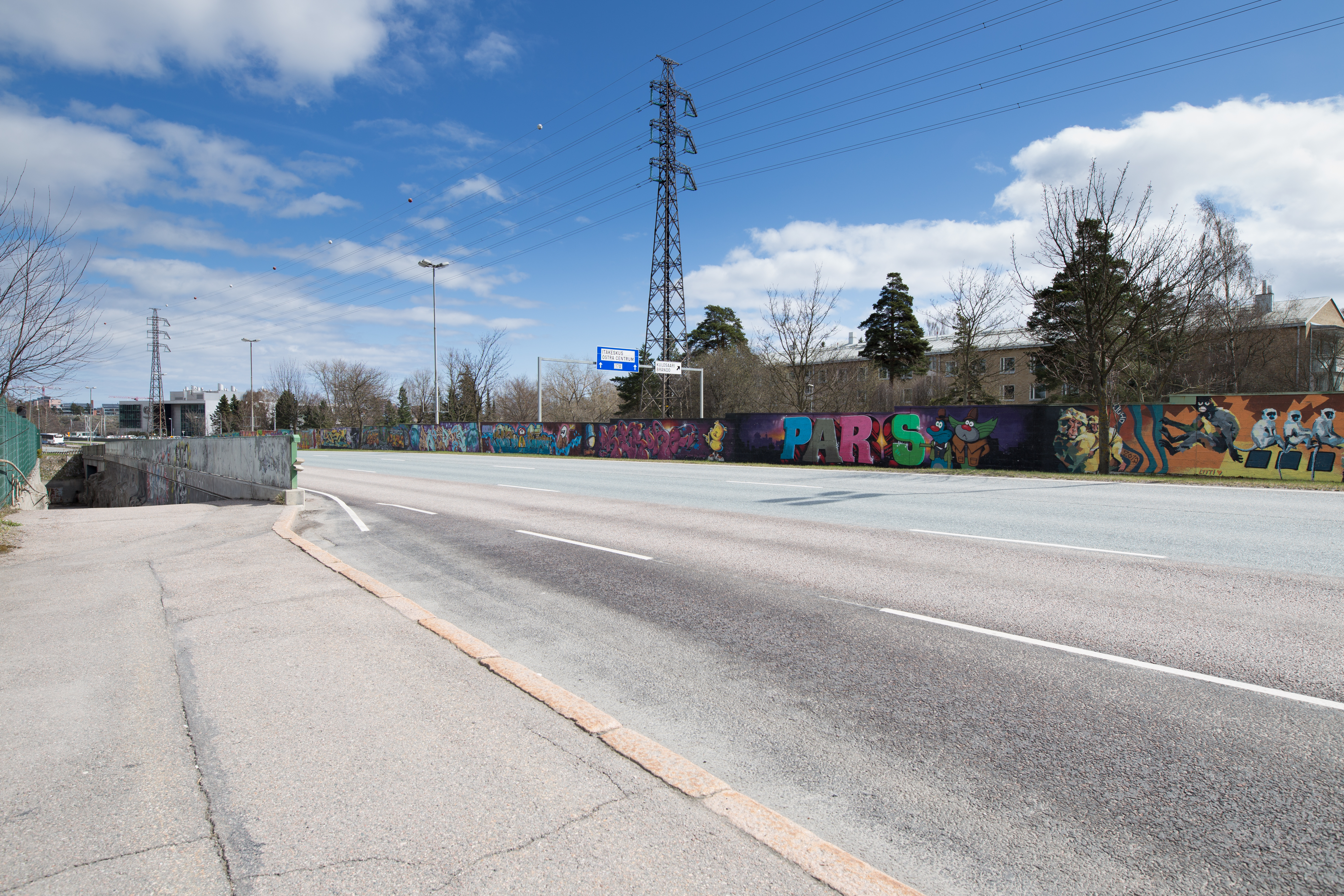 Kulosaaren melumuurin graffititaideteos